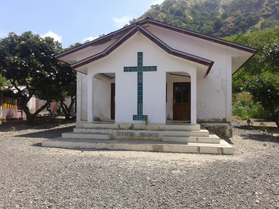 Atauro